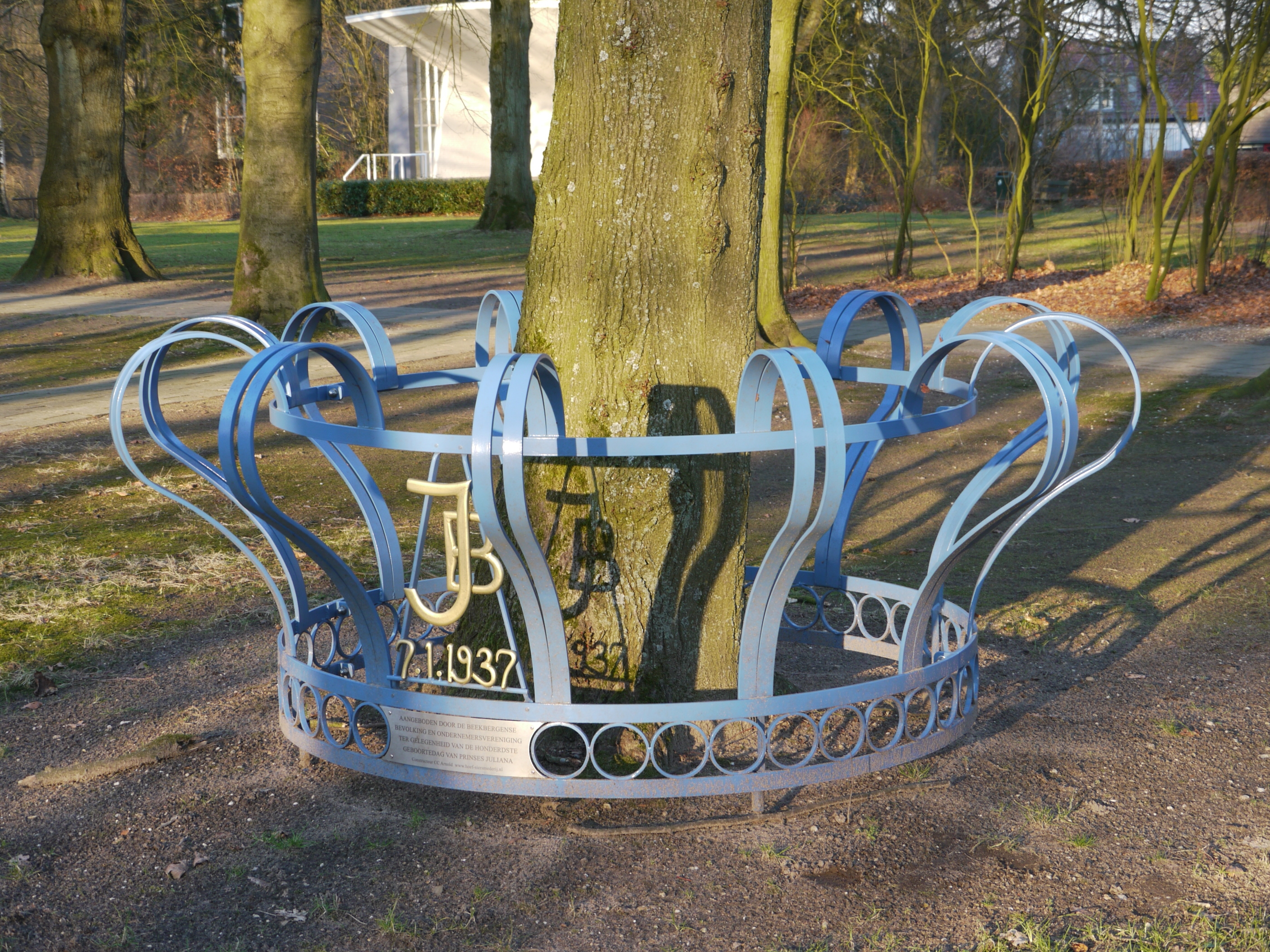 Sierhekwerk om de Julianaboom te Beekbergen. Aangeboden door de Beekbergense bevolking en ondernemersvereniging ter gelegenheid van de honderdste geboortedag van Prinses Juliana. De boom werd geplant ter gelegenheid van het huwelijk van prinses Juliana en prins Bernhard, dat op 7 januari 1937 werd gesloten. Het eerdere hekwerk was aan vervanging toe; het kunstwerk op deze foto werd onthuld op 5 mei 2009, door Apeldoorns wethouder Rob Metz en dorpsraadvoorzitter Atze Oosterwoud. Locatie: Teixeira de Mattospark, Loenenseweg, Beekbergen (gem. Apeldoorn)